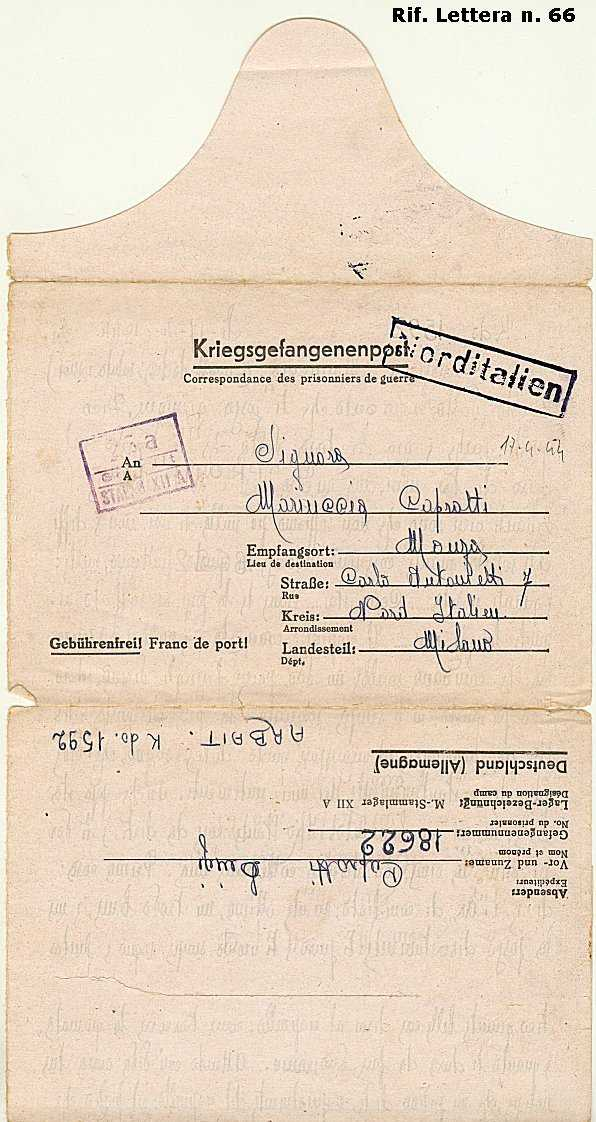 Luigi Caprotti frontespizio della lettera inviata alla moglie Maria Busnelli via Carlo Antonietti, 7, Monza datata 17.4.1944. Prigioniero n. 18622 campo di prigionia STALAG XIIA (1940-1945) Arbait K.do 1592 Limburgo, Distretto di Wehrkreis XII, Wiesbaden, Germania.